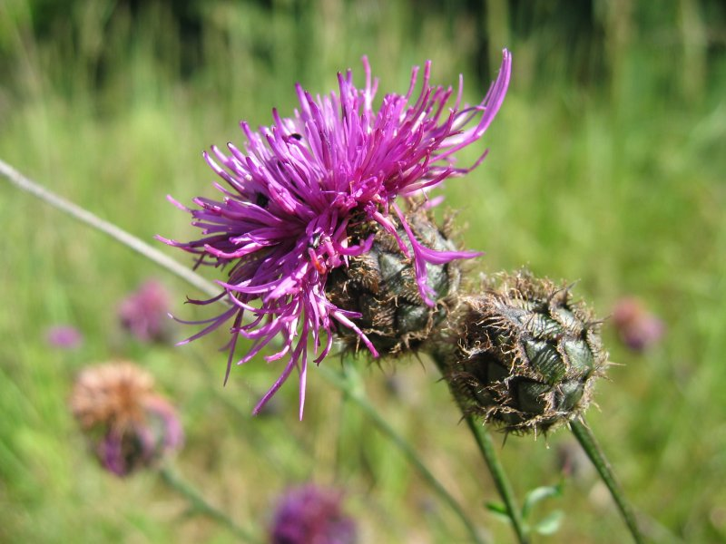 Skabiosen-Flockenblume Centaurea scabiosa, Müritz-Gebiet